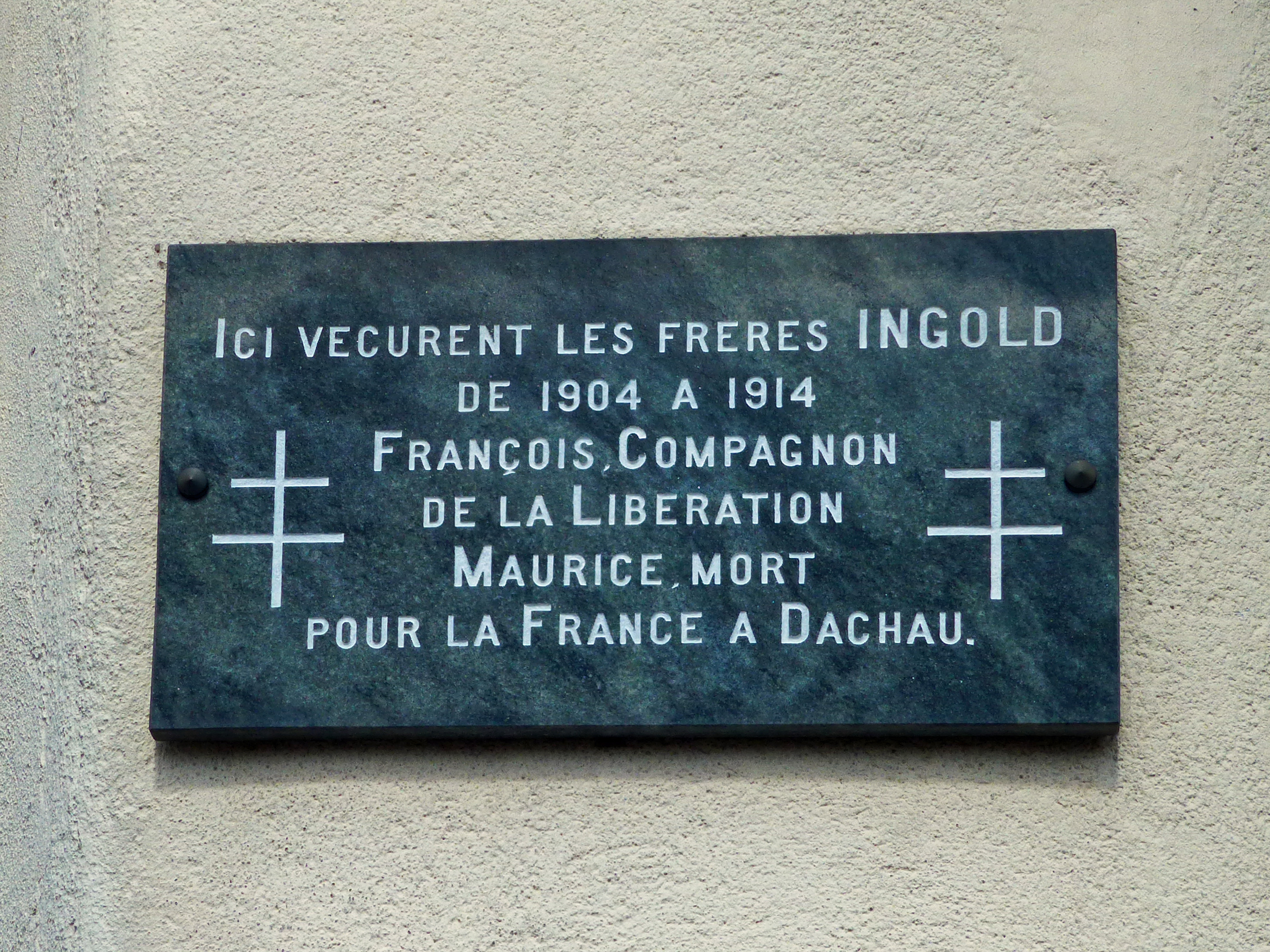 Fraize (Vosges) : plaque commémorative des frères François et Maurice Ingold qui y vécurent de 1904 à 1914